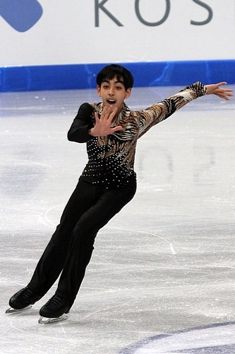 Мишель Кристиан Мартинез (Филиппины) на чемпионате мира по фигурному катанию среди юниоров 2012